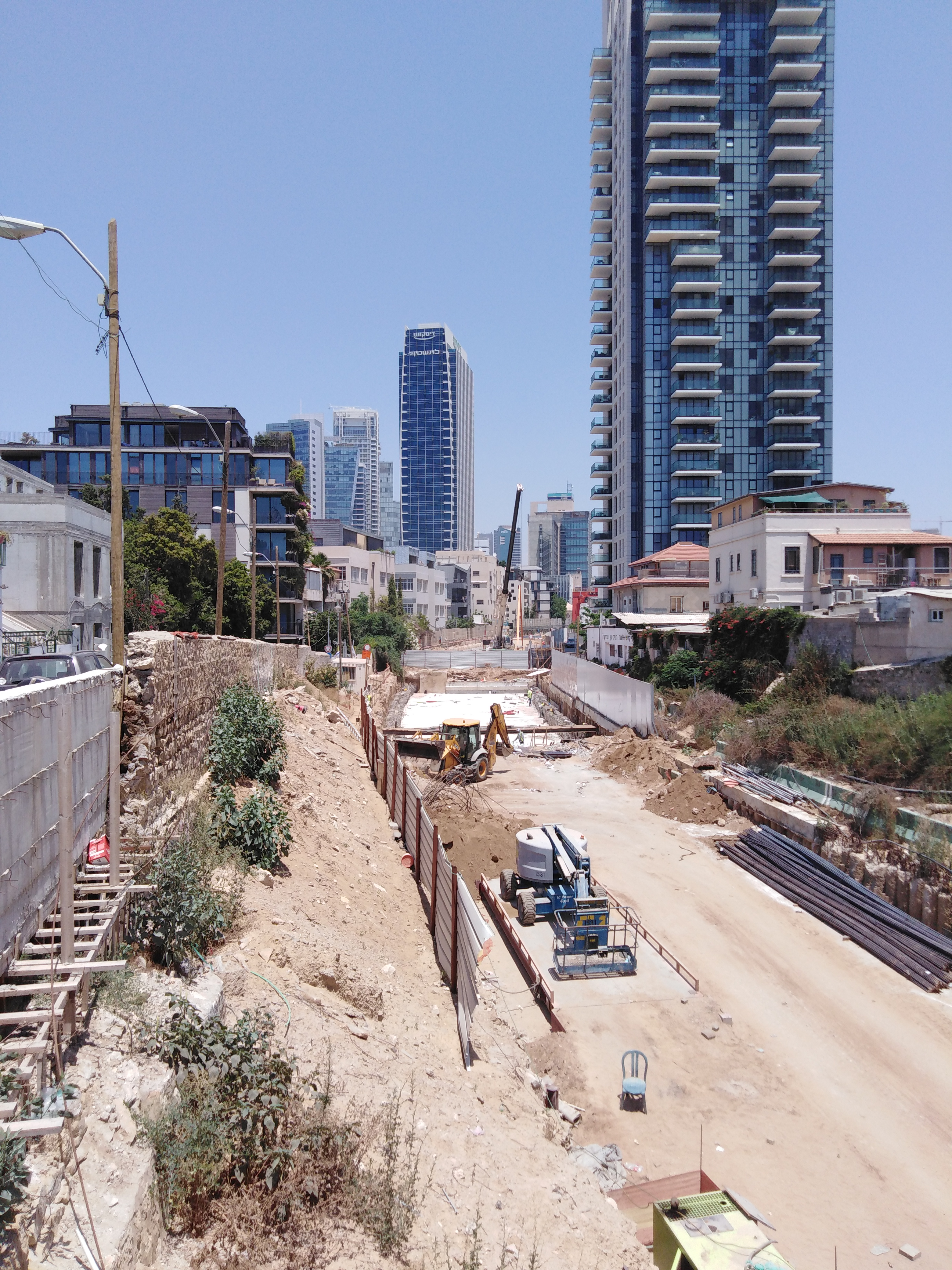 Собственное фото, сделанное с моста по ул. Неве-Цедек.